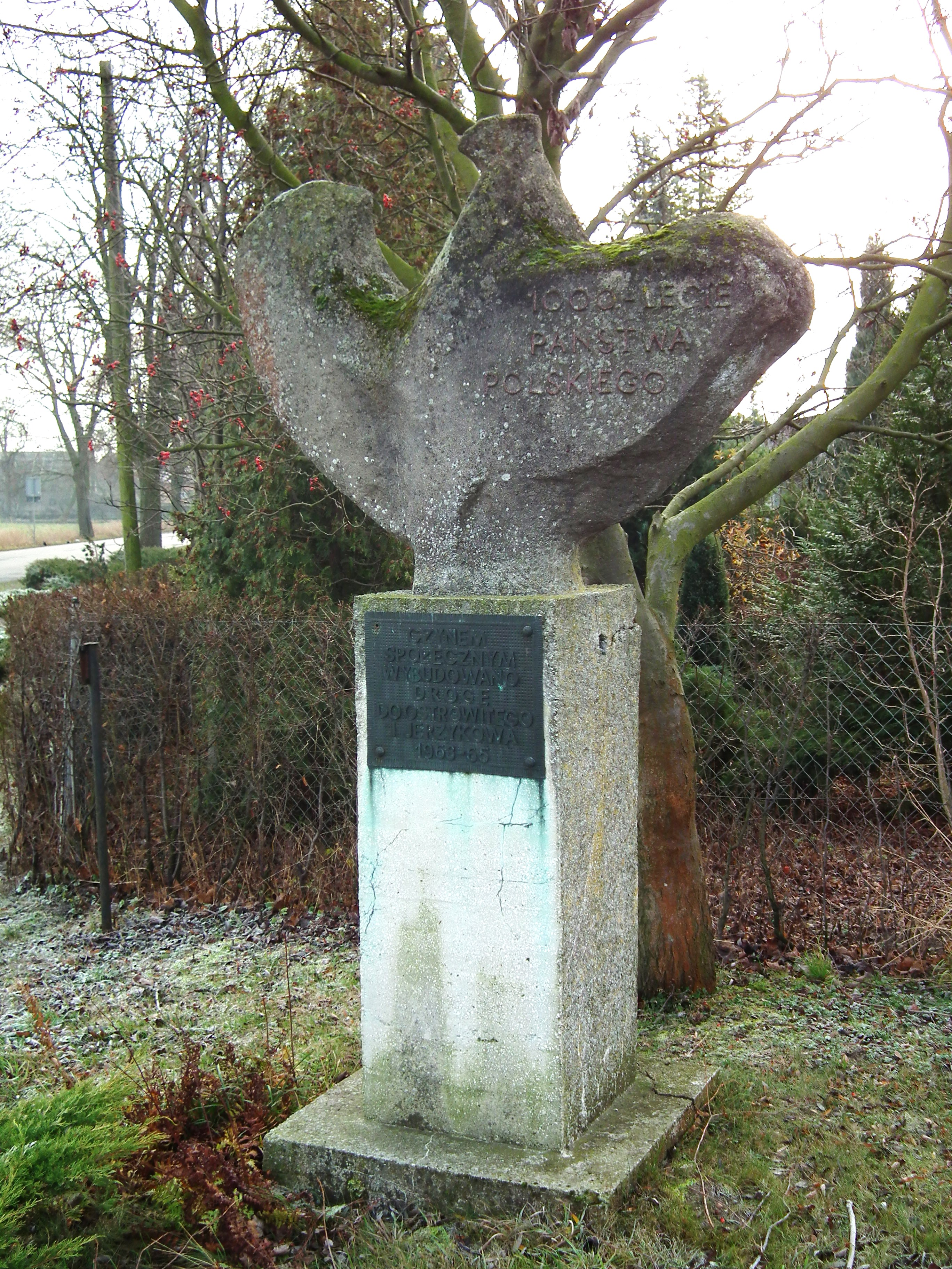 Pomnik w Trzemżalu na Tysiąclecie Państwa Polskiego.